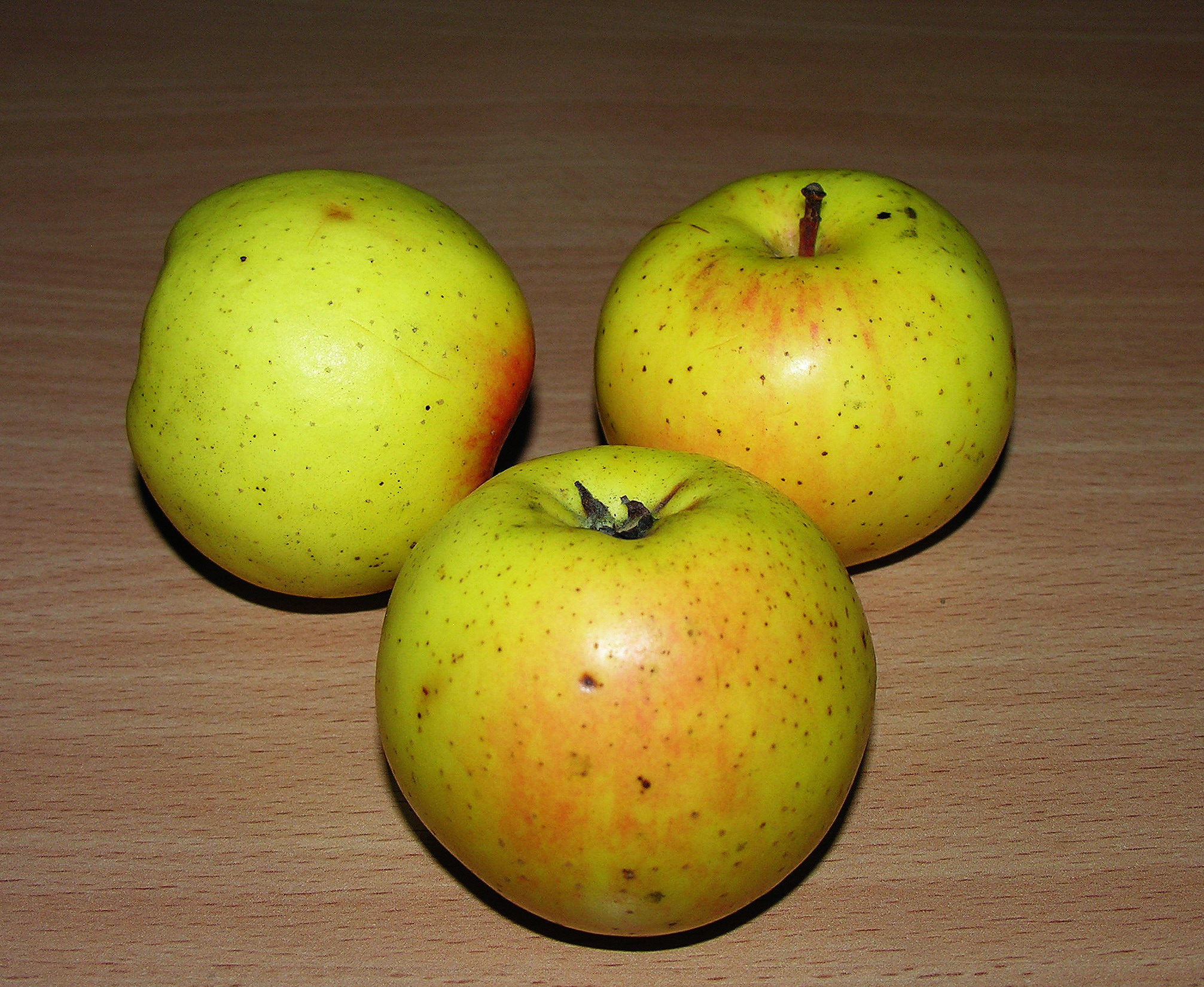 Telisare 2008 m. sausio 24 d., Lietuva